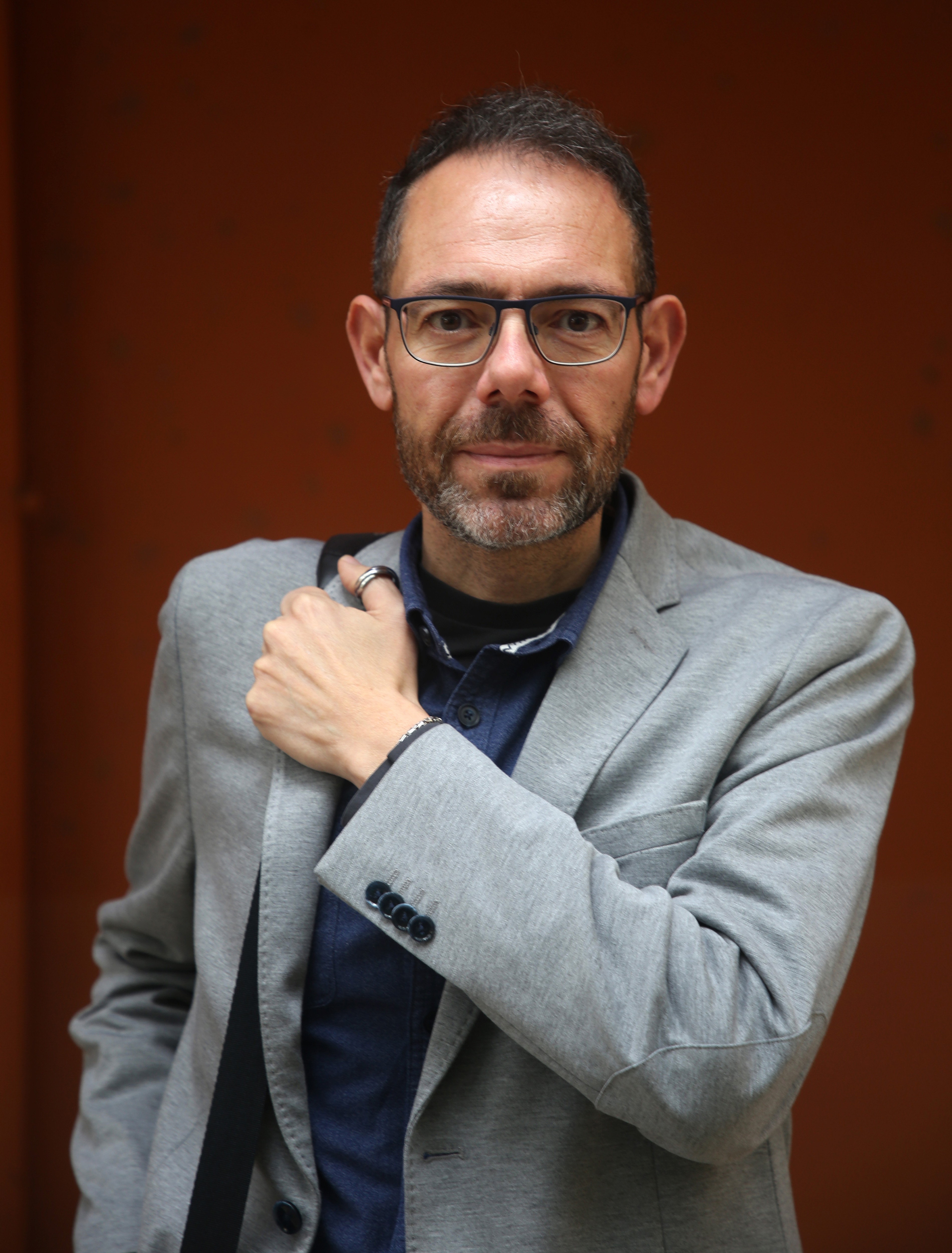 Alfonso Galindo Hervás